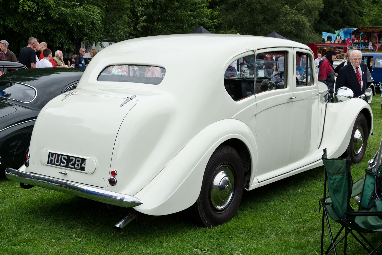 Daimler DE27 (1949)Hebden Bridge Vintage Weekend 04/08/2013